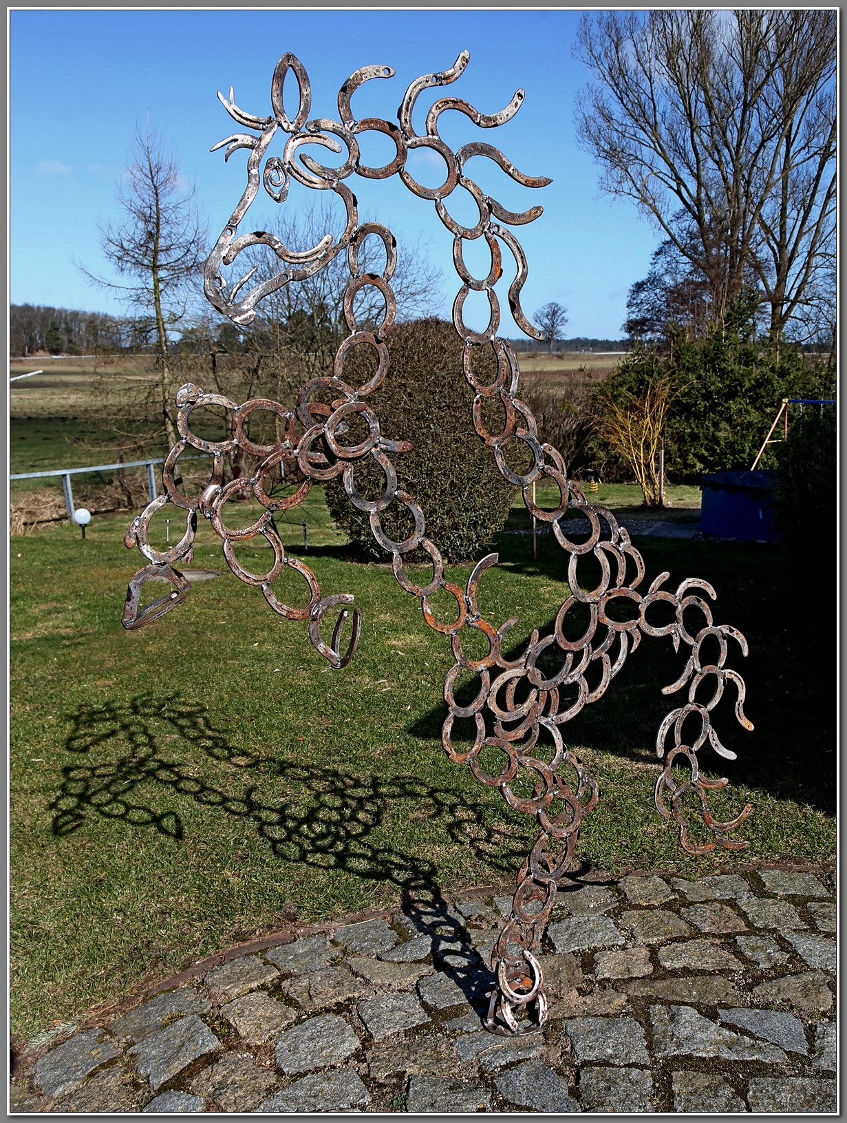 Metallplastik eines steigenden Pferdes aus Hufeisen